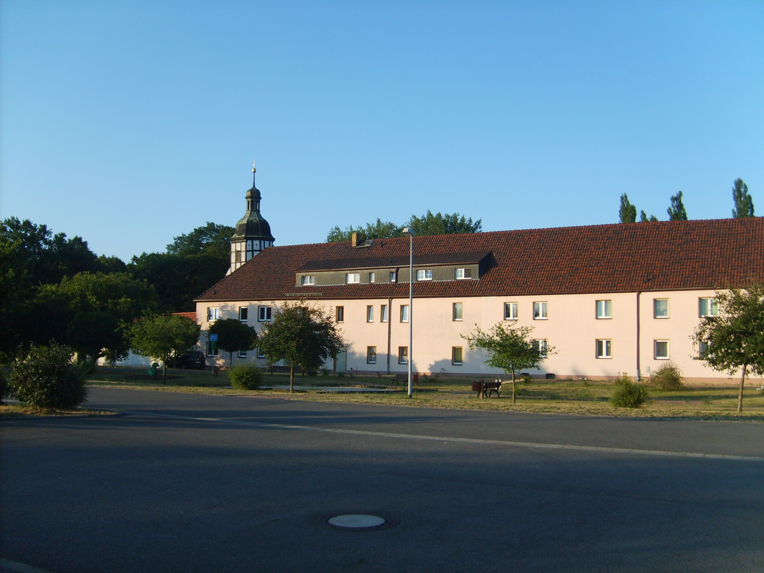 Gut Saathain